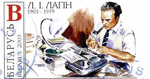 Марка "100 лет со дня рождения Лазаря Лагина", 4 декабря 2003. Художник - Татьяна Дольская